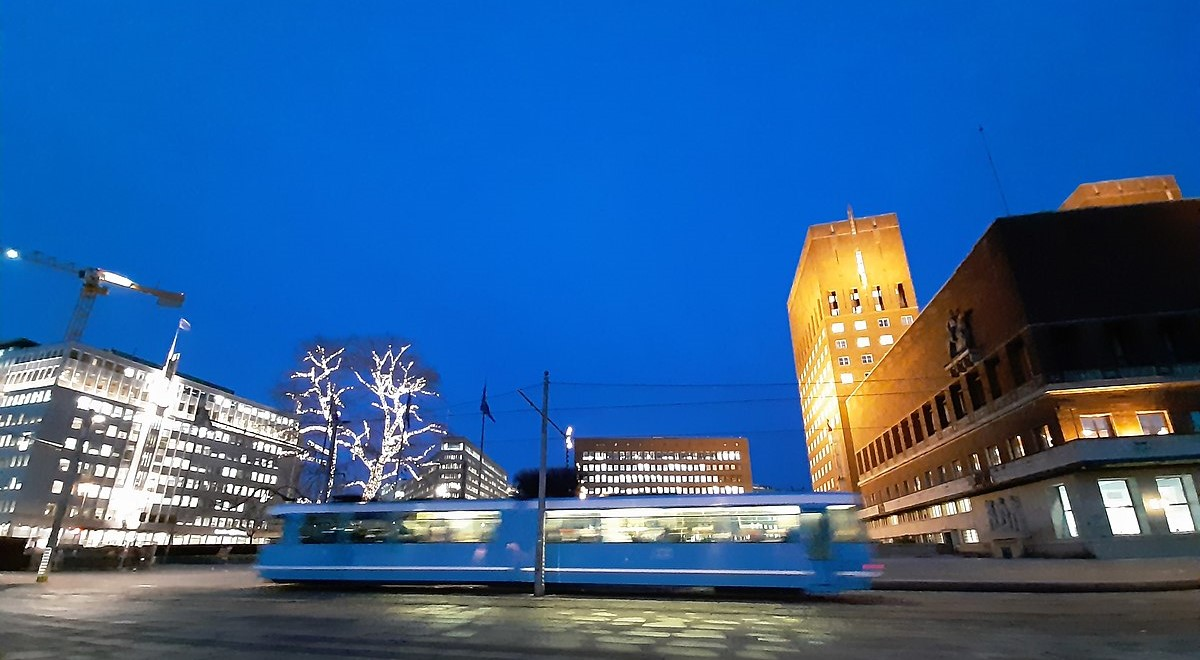 Oslo, Noruega, Jan. 2020